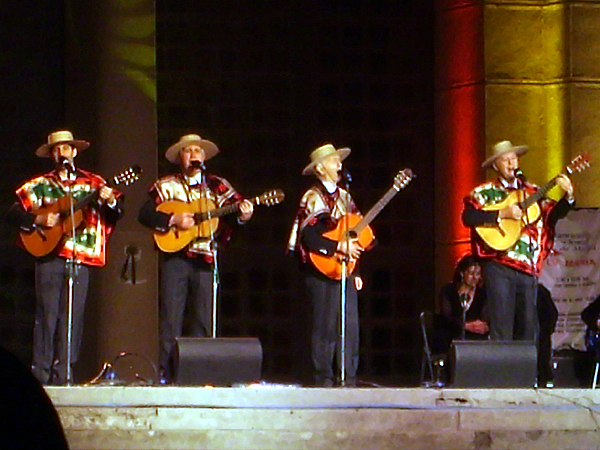 Los Huasos Quincheros presentándose en vivo en el concierto en homenaje a la Virgen del Carmen, realizado en la explanada del Templo Votivo de Maipú la noche del sábado 8 de diciembre de 2007.